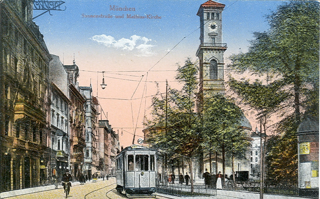 Postkarte, undatiert ( ca.1918 ). Beschriftung: "München - Sonnenstraße und Matthias-Kirche."